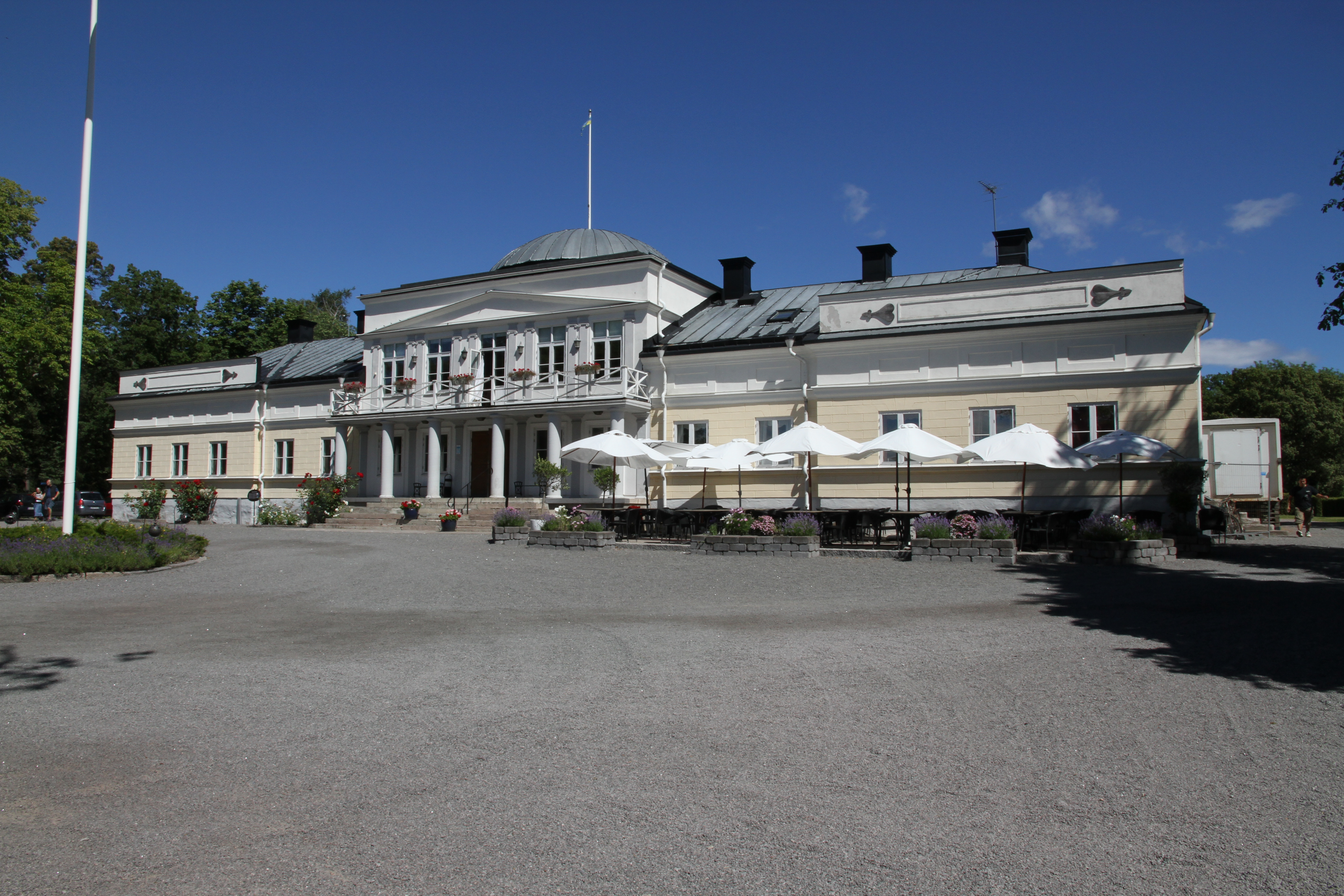 Gränsö Slott, Västervik 20 juli 2013.